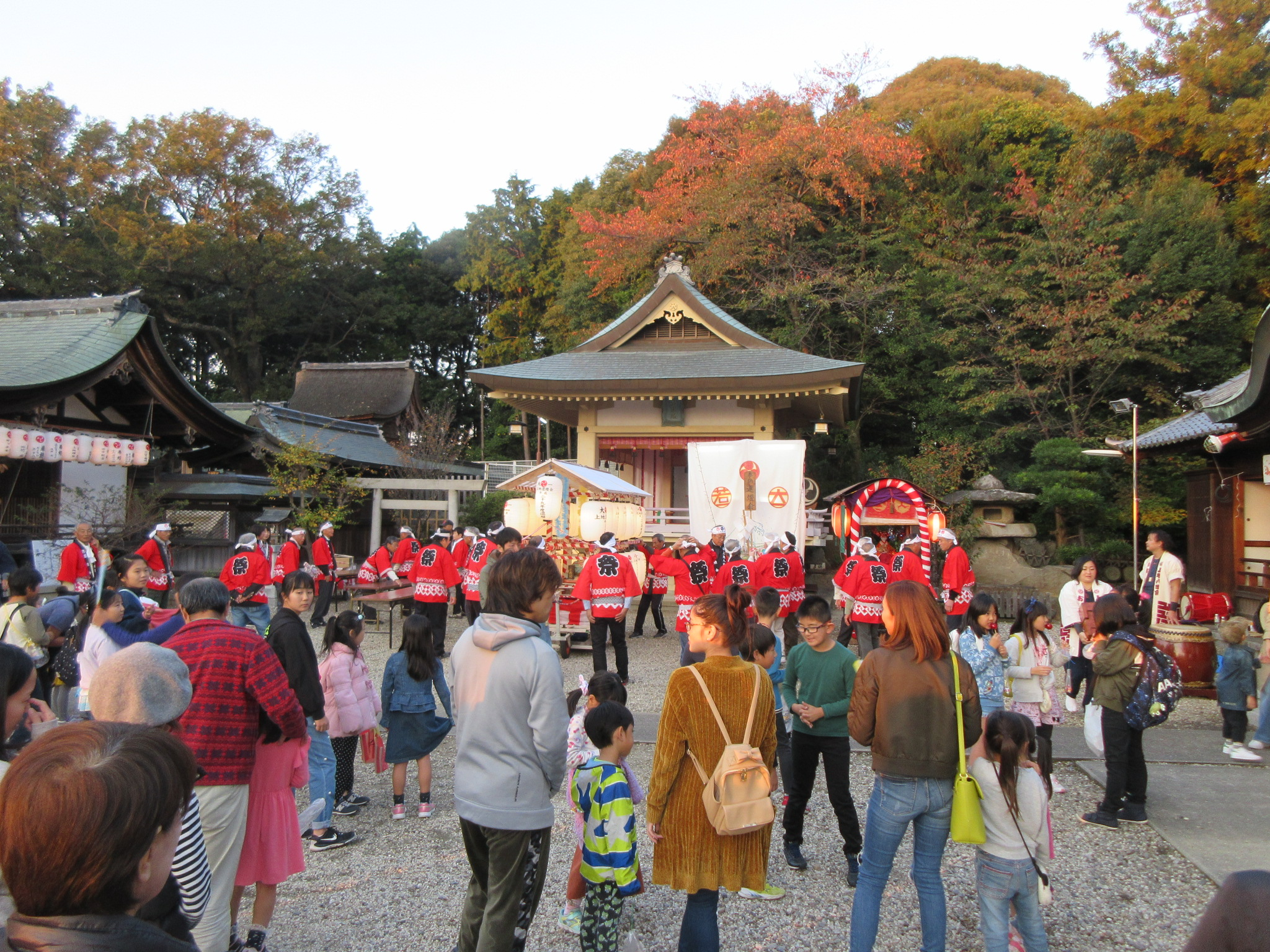 上地八幡宮例大祭（愛知県岡崎市）